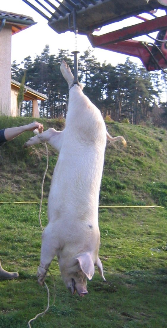 cochon pendu lors de la tuaille en Ardeche